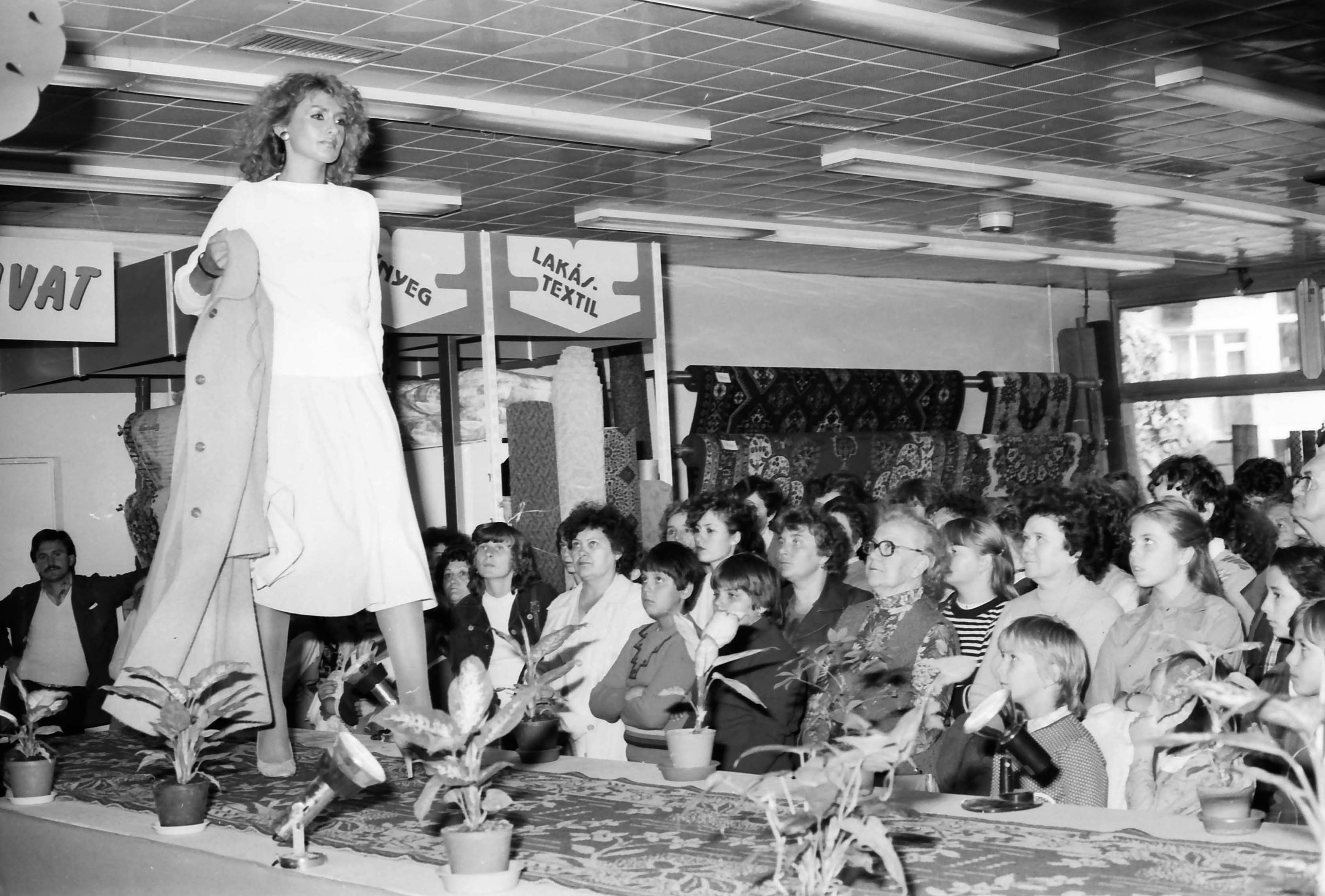 Divatbemutató, a manöken Halász Ilona. Location: Hungary Tags: fashion show Title: Divatbemutató, a manöken Halász Ilona.